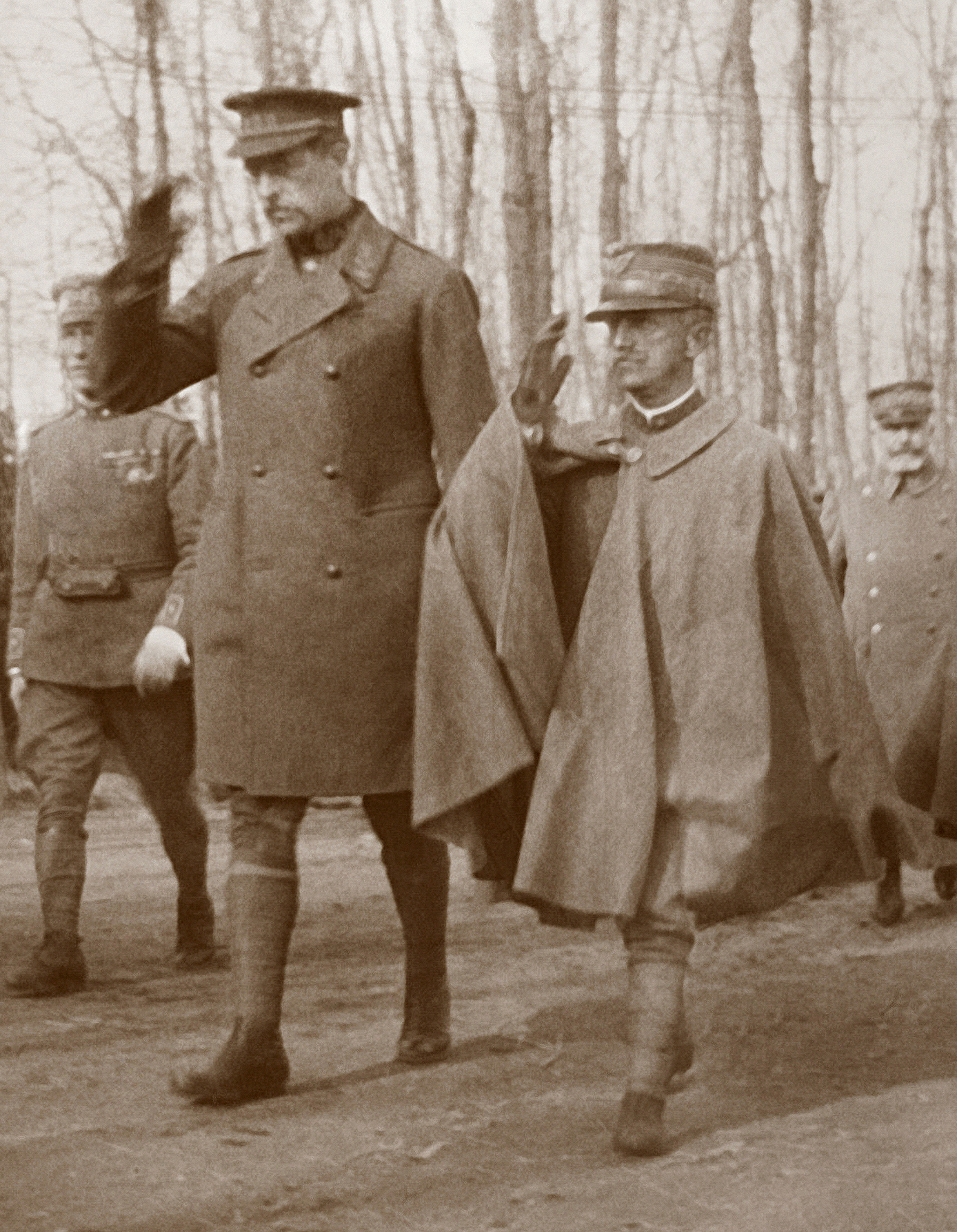 Immagine dalla città di Genova. Castello d'Albertis - interni - il Re Vittorio Emanuele III ed il re Alberto del Belgio